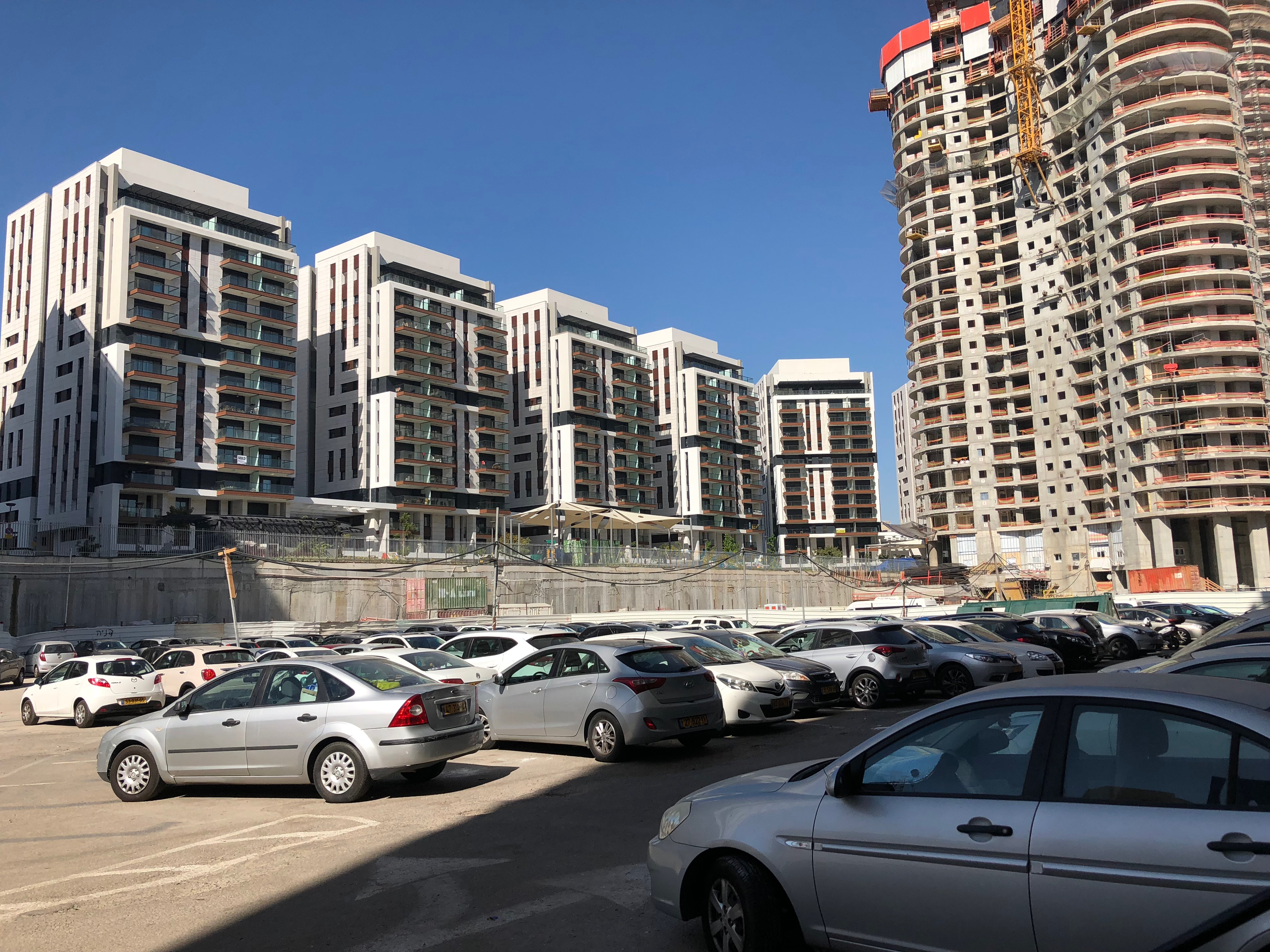 תמונה מעודכנת של מתחם השוק הסיטונאי בתל אביב. התמונה צולמה ב-26 באוקטובר 2017